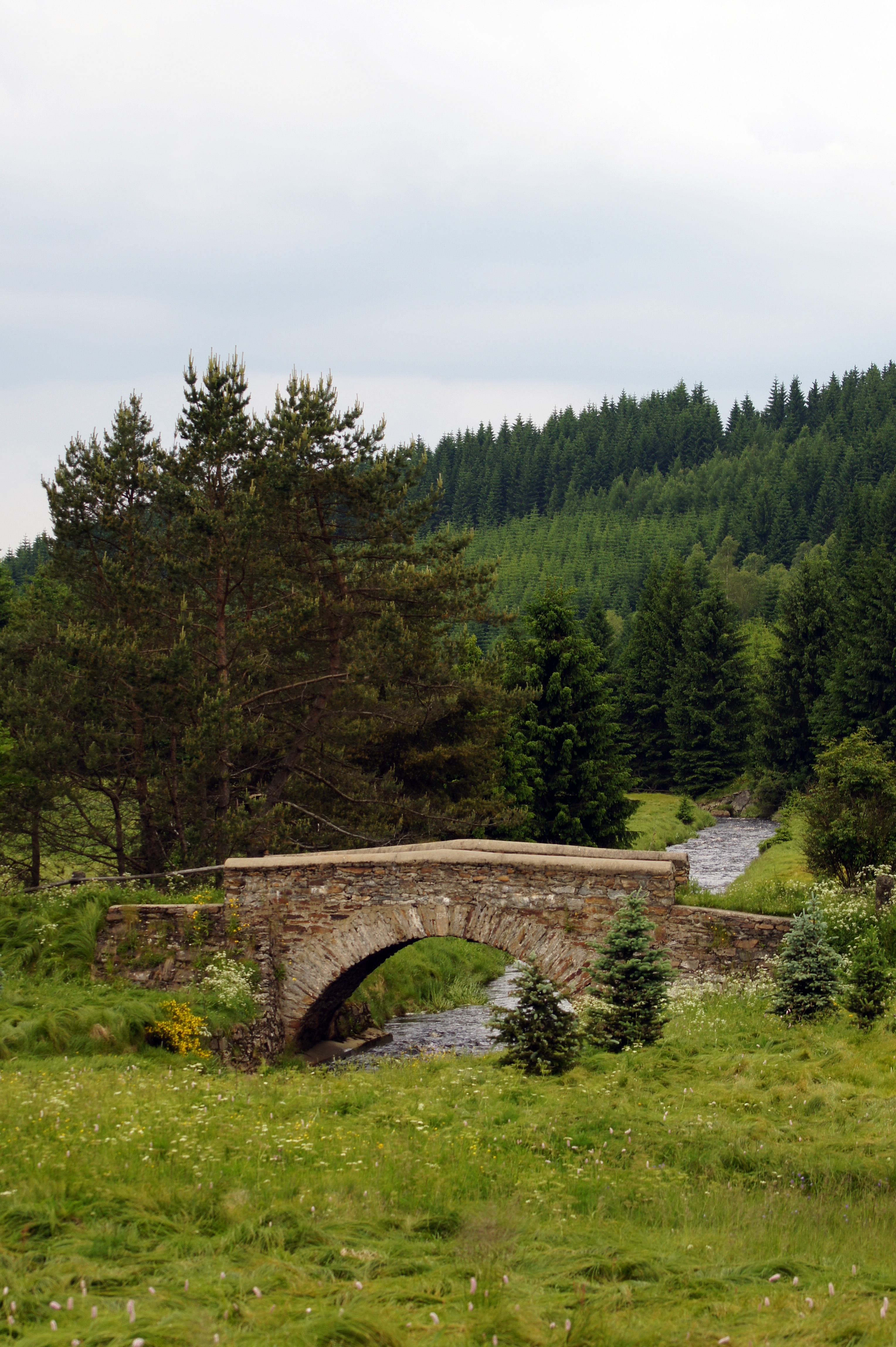 Steinbrücke in Marienberg-Kühnhaide im oberern Abschnitt des Schwarzwassertals (Schwarze Pockau)